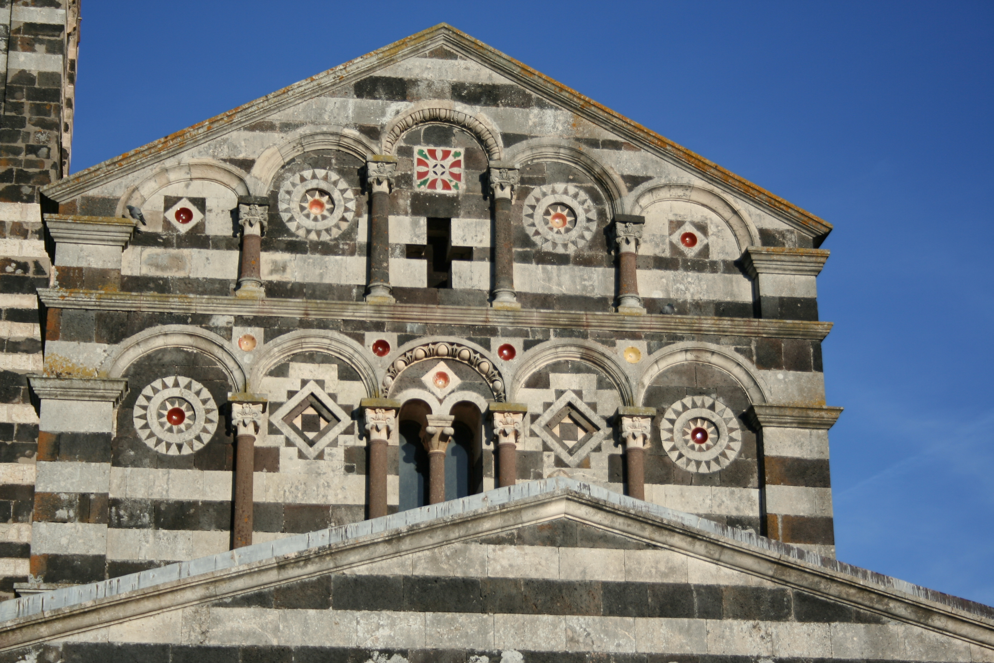 Particolare della facciata dell'abbazia di Saccargia (Codrongianos)